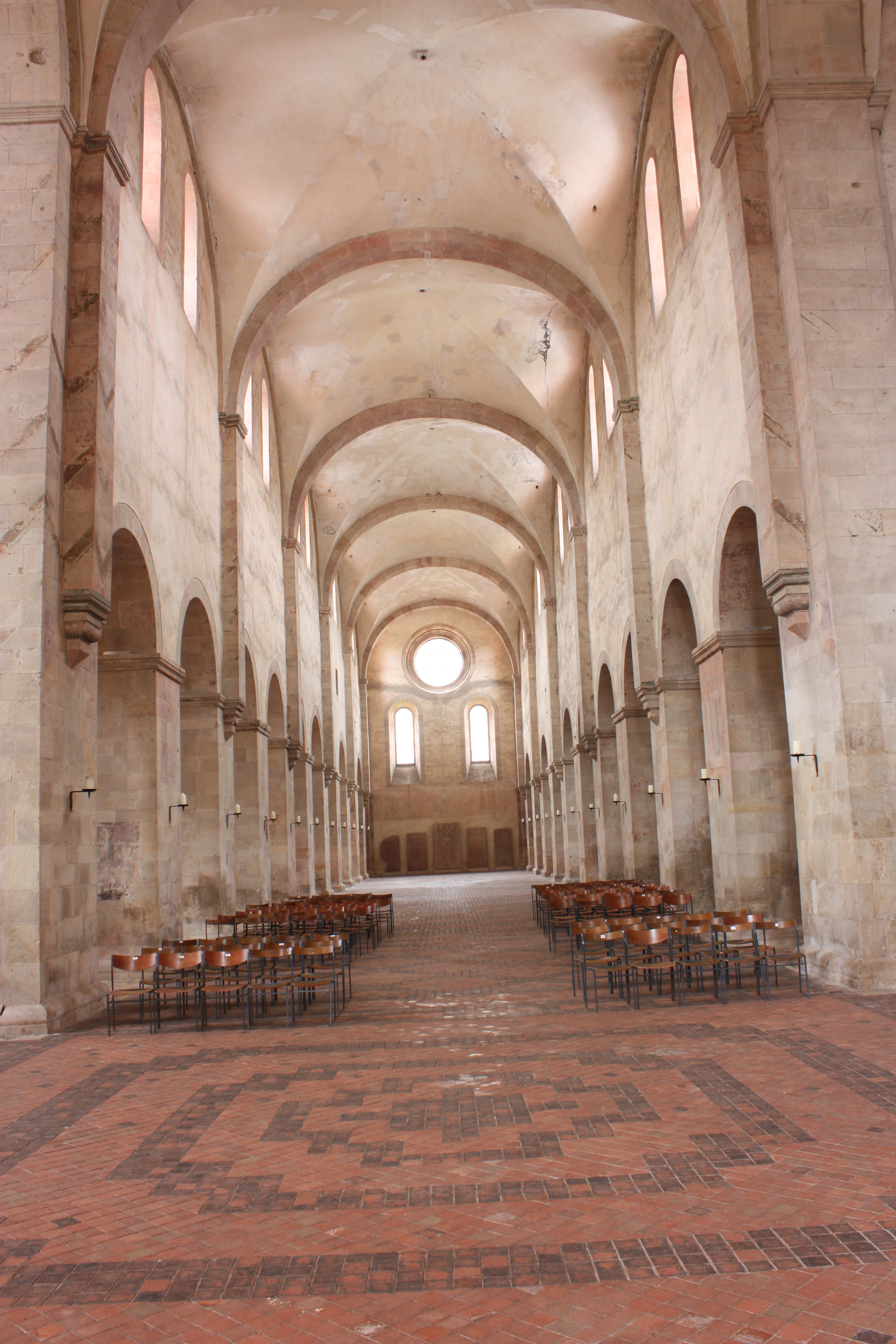 Blick in das Langhaus der Basilika des Klosters Eberbach